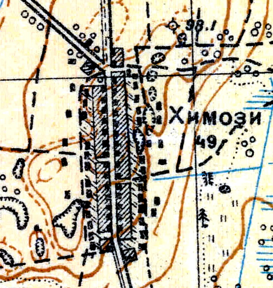 Топографическая карта Ленинградской области, квадрат О-36-13-А-в (Красногвардейск), деревня Химози